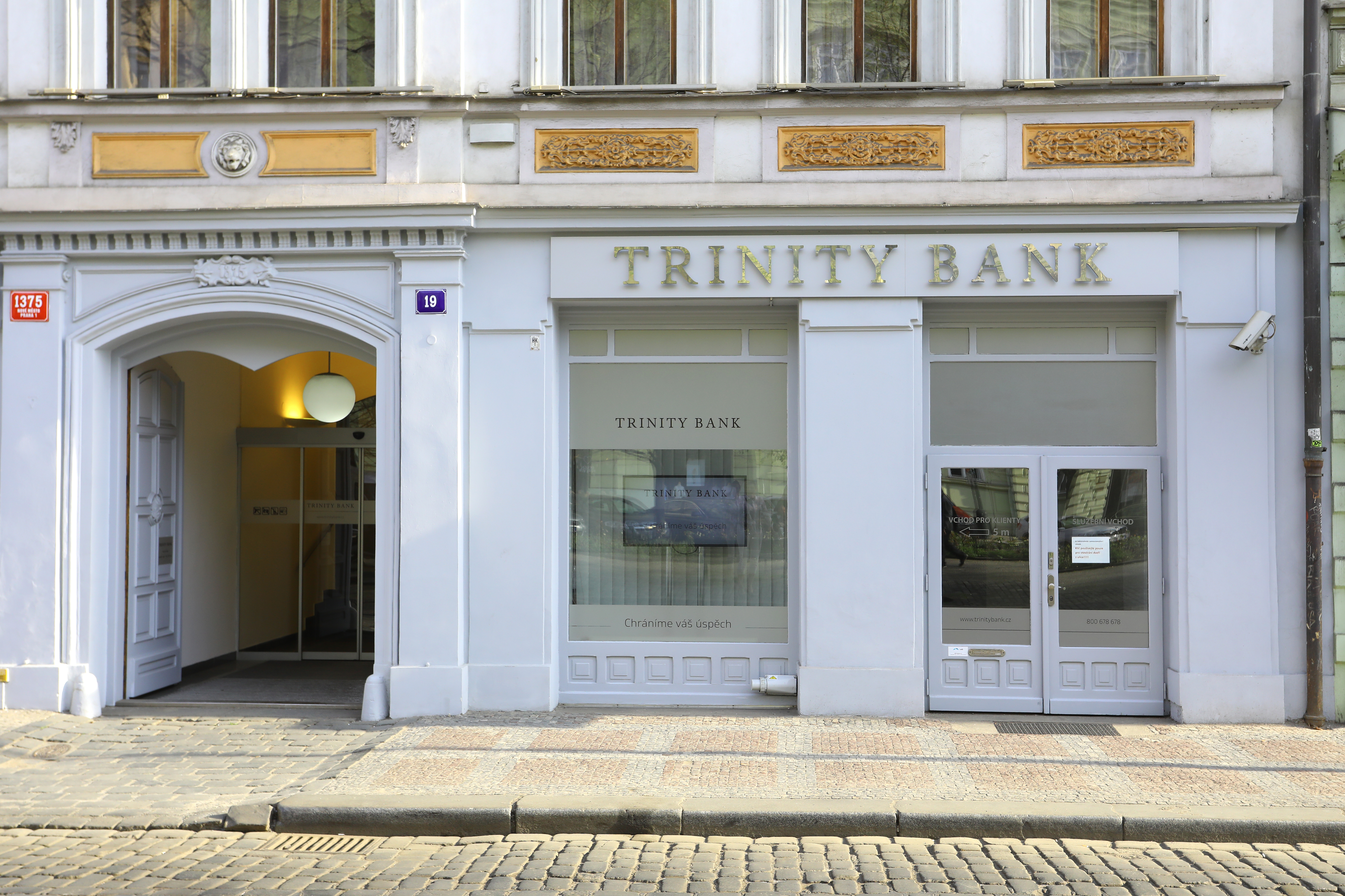 Budova Trinity Bank v Praze na Senovážném náměstí, čp. 1375/19